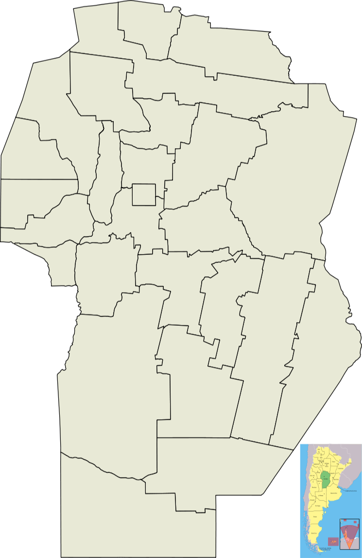 Mapa de la Provincia de Córdoba.